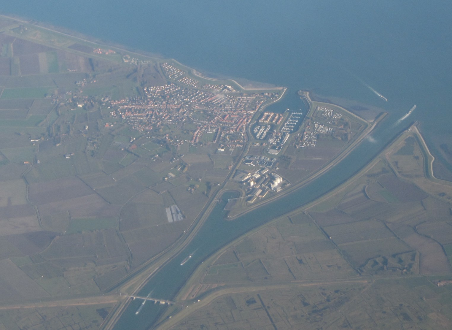 Wemeldinge